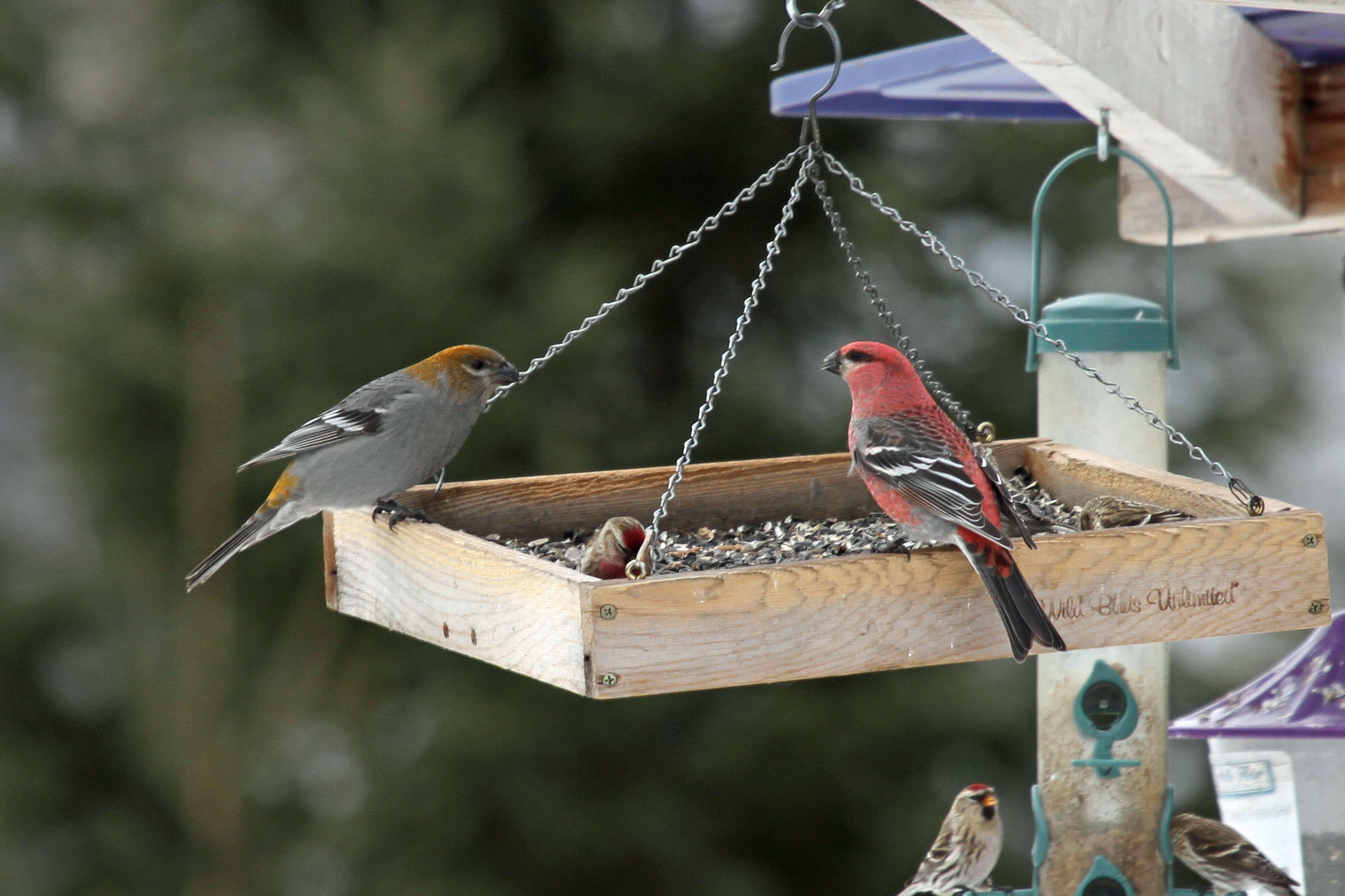 Pine Grosbeak